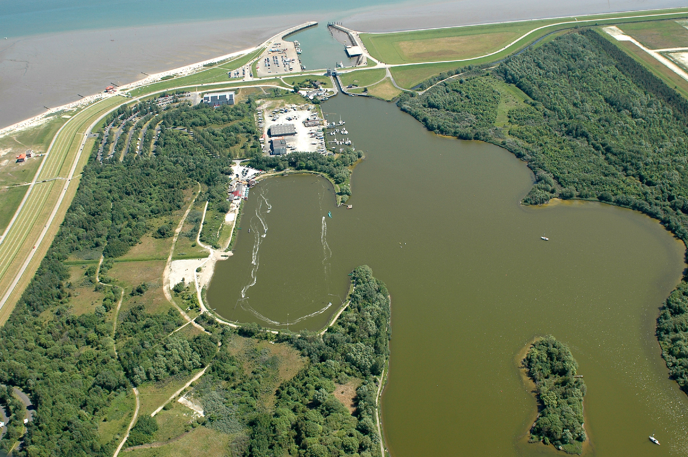 Hooksieler Binnentief mit Schleuse Hooksiel zur Nordsee. Entstanden während eines Fotofluges vom Flugplatz Nordholz-Spieka über Cuxhaven und Wilhelmshaven.